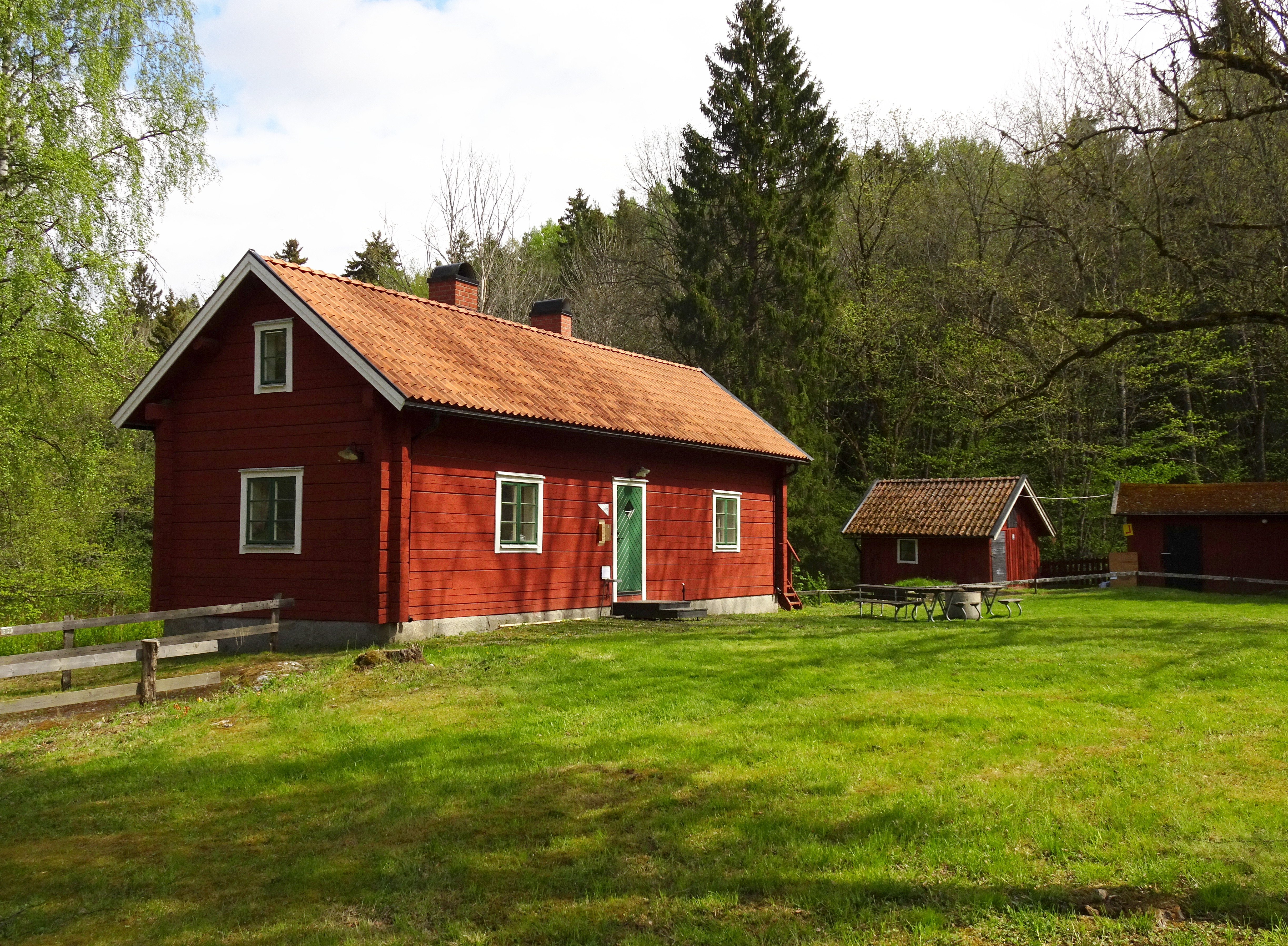 Gladö kvarn, torpet Mellanberg